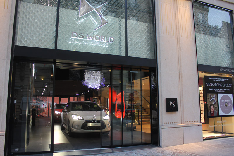 DS World in Paris